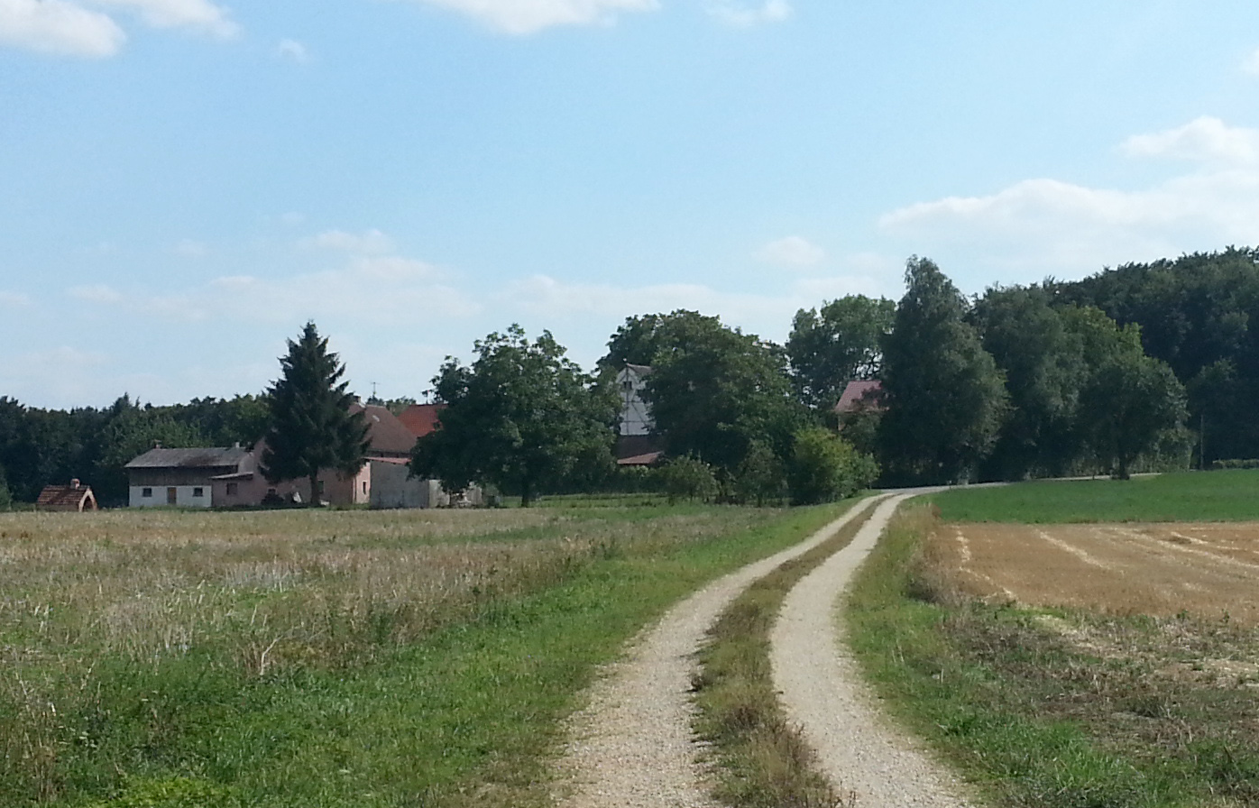 Blick auf den Kellerhof - von Willenhofen kommend